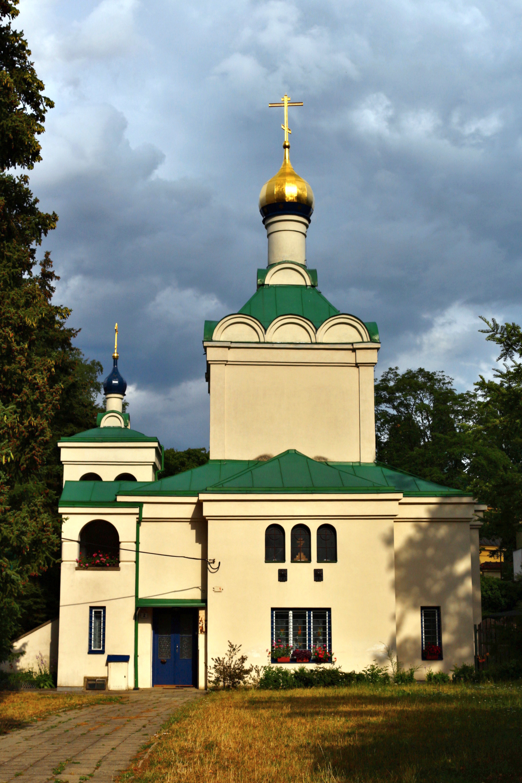 Pravoslavný chrám sv. Václava s Ludmily, Třebíč